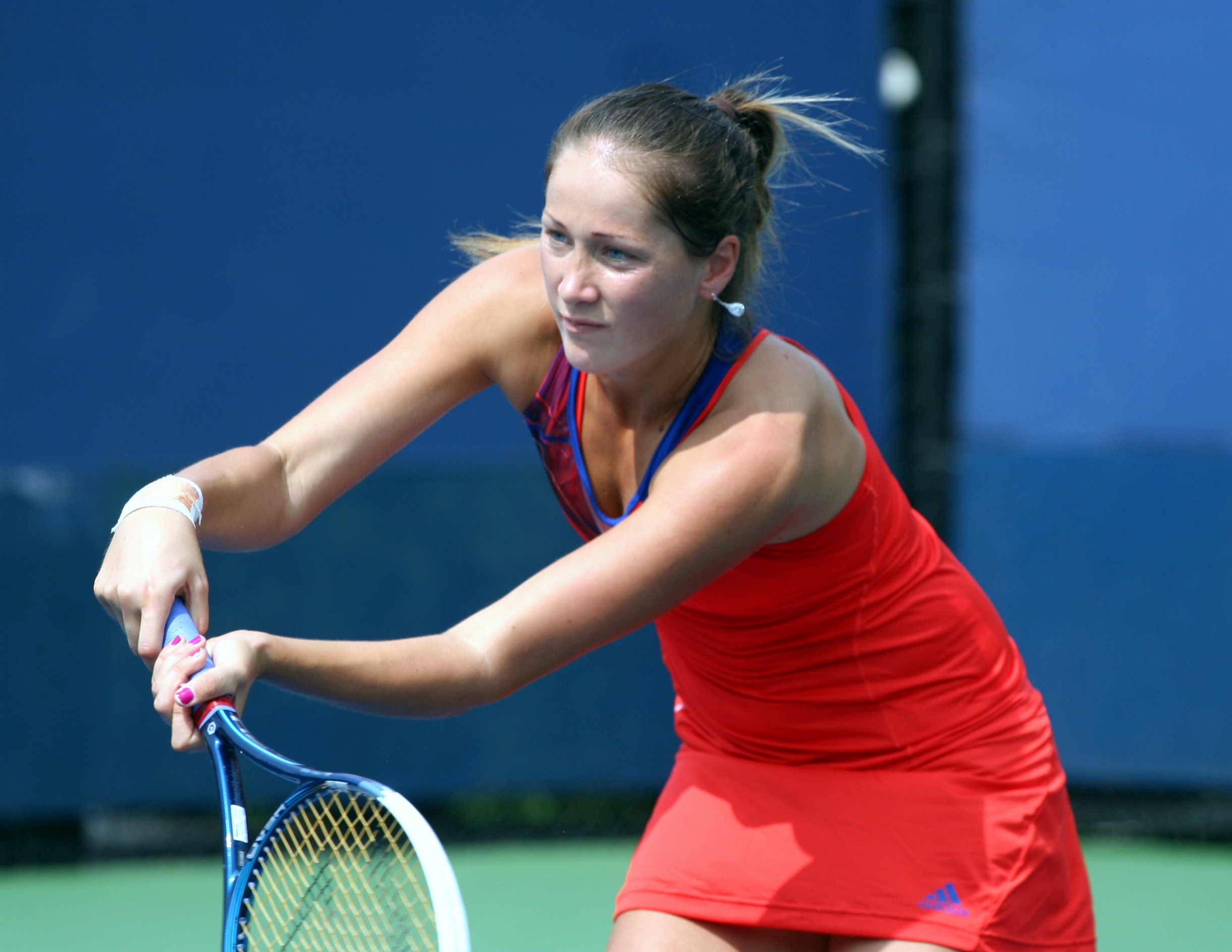 Wednesday, August 28 2013, US Open